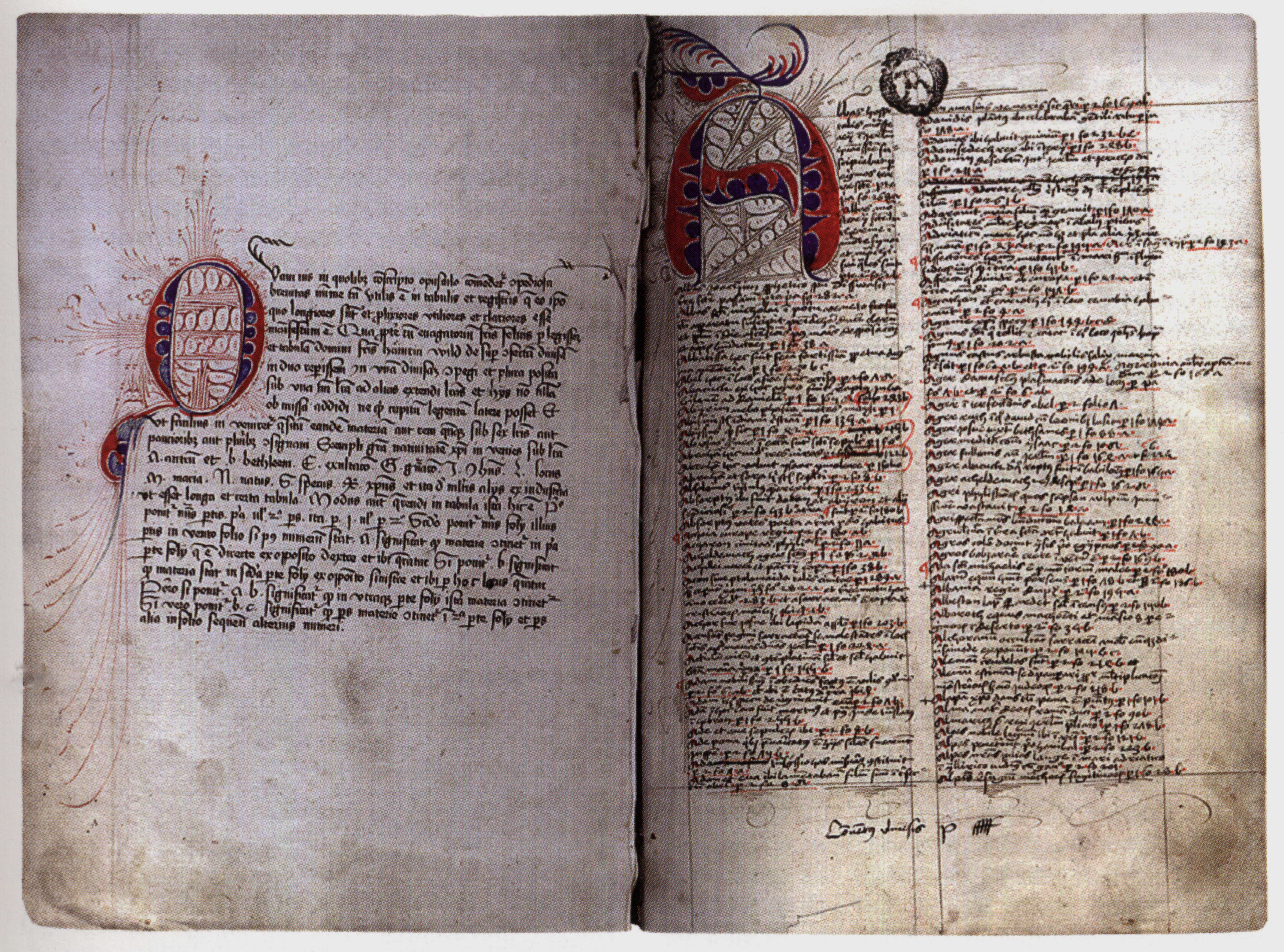 Felix Fabri "Evagatorium in Terrae Sanctae, Arabiae et Egypti peregrinationem", 2 Bde., 1484-88 (staB Ulm) Die ersten zwei Seiten der handschriftlichen Fassung des Autors.